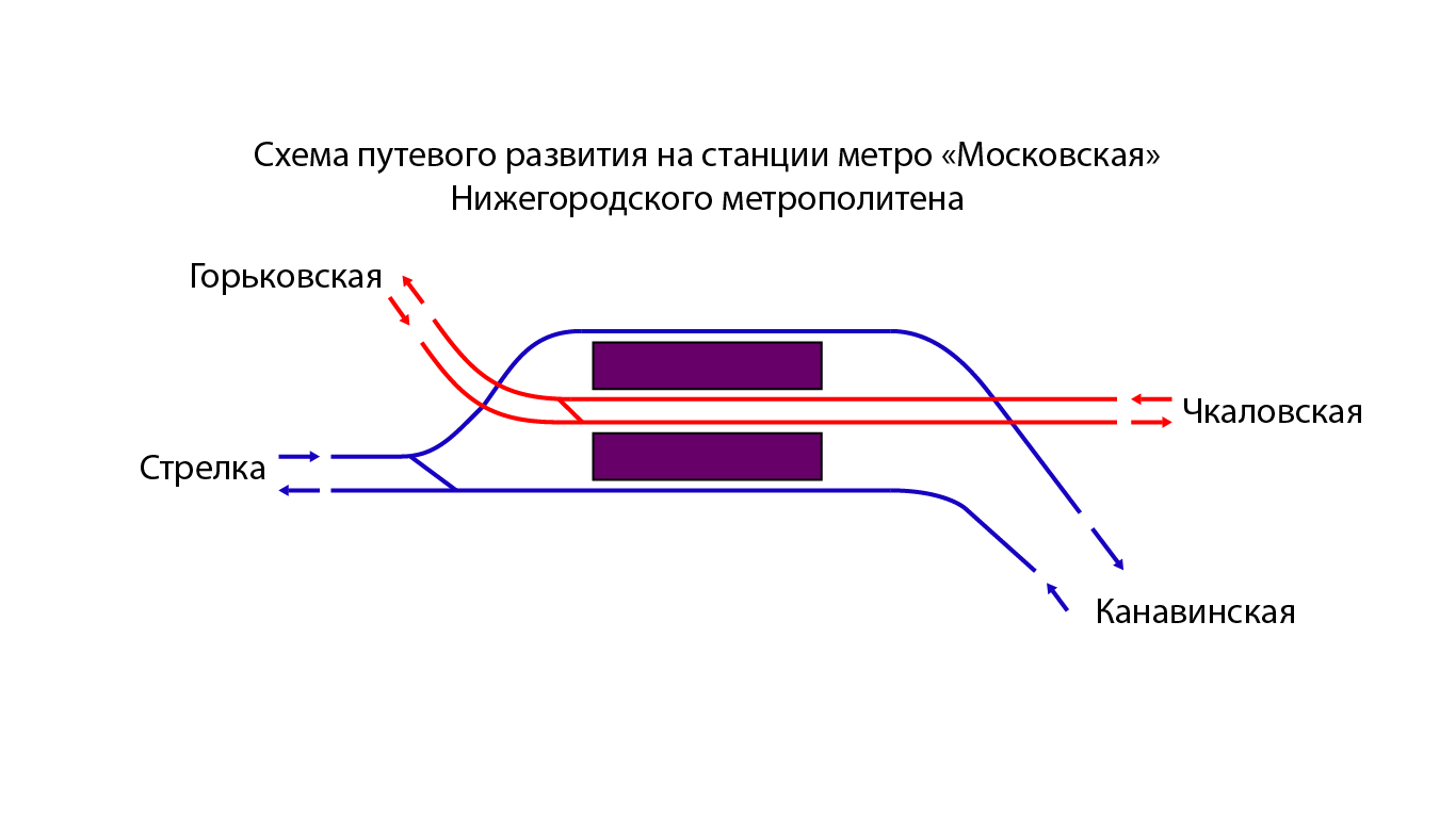 Схема развязки на станции Московская Нижегородского метрополитена